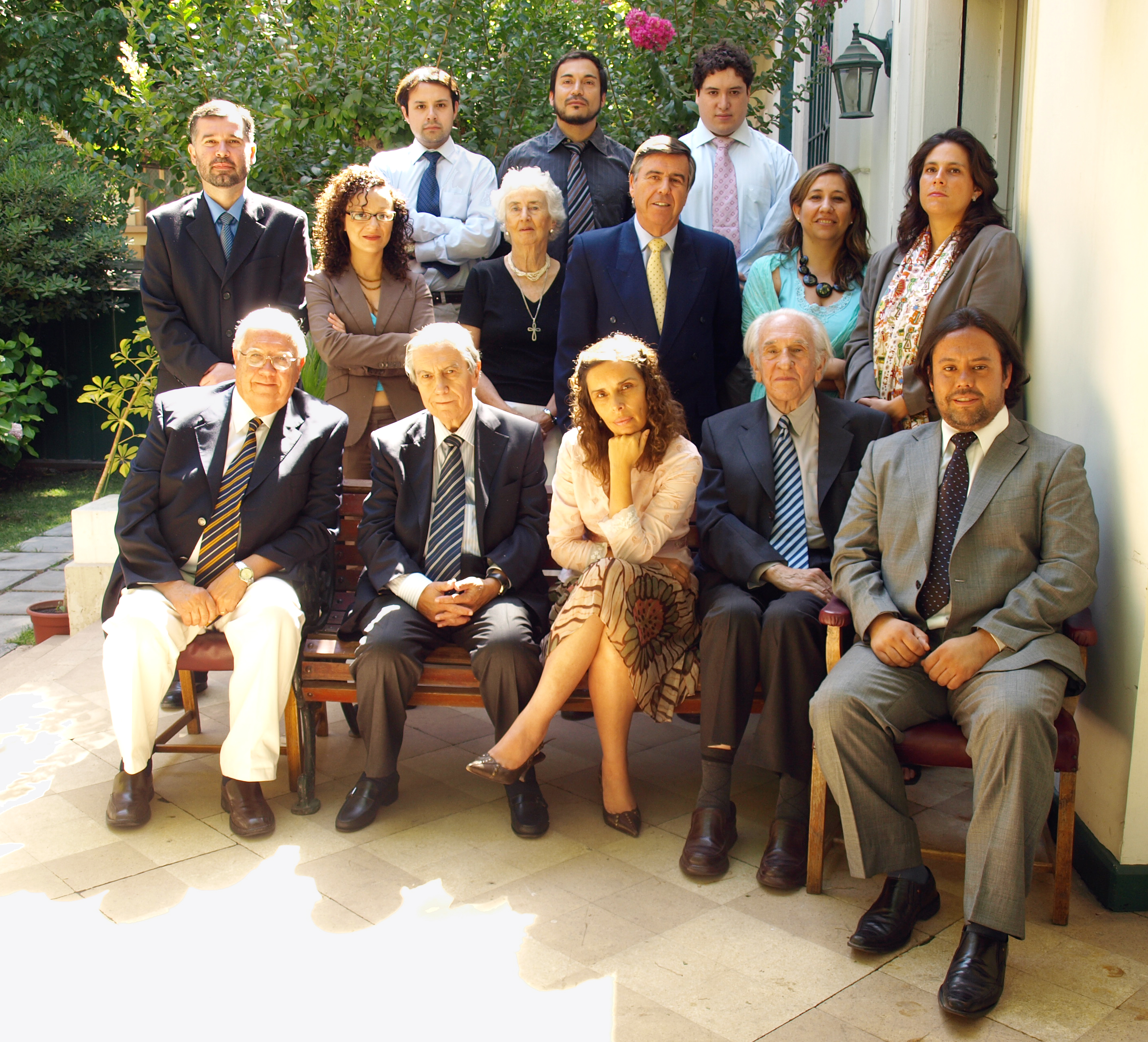 El cuerpo académico del Instituto de Estudios Internacionales de la Universidad de Chile está integrado por expertos del más alto nivel, que han desarrollado trabajos en el área de las relaciones internacionales, las ciencias políticas, el derecho, la economía internacional, los estudios estratégicos, la solución de conflictos y las relaciones con el Asia-Pacífico. Se trata de docentes que se han formado en variadas aulas universitarias y bajo diversas tradiciones académicas, algunos de ellos han ocupado importantes cargos públicos y privados, que les han permitido participar directamente en la solución de controversias internacionales.